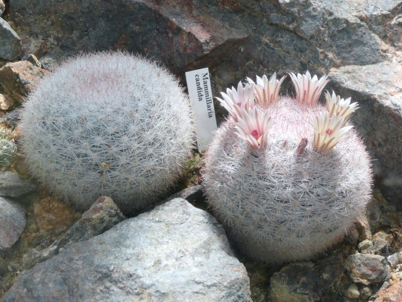 Botanischer Garten Erlangen, 2008